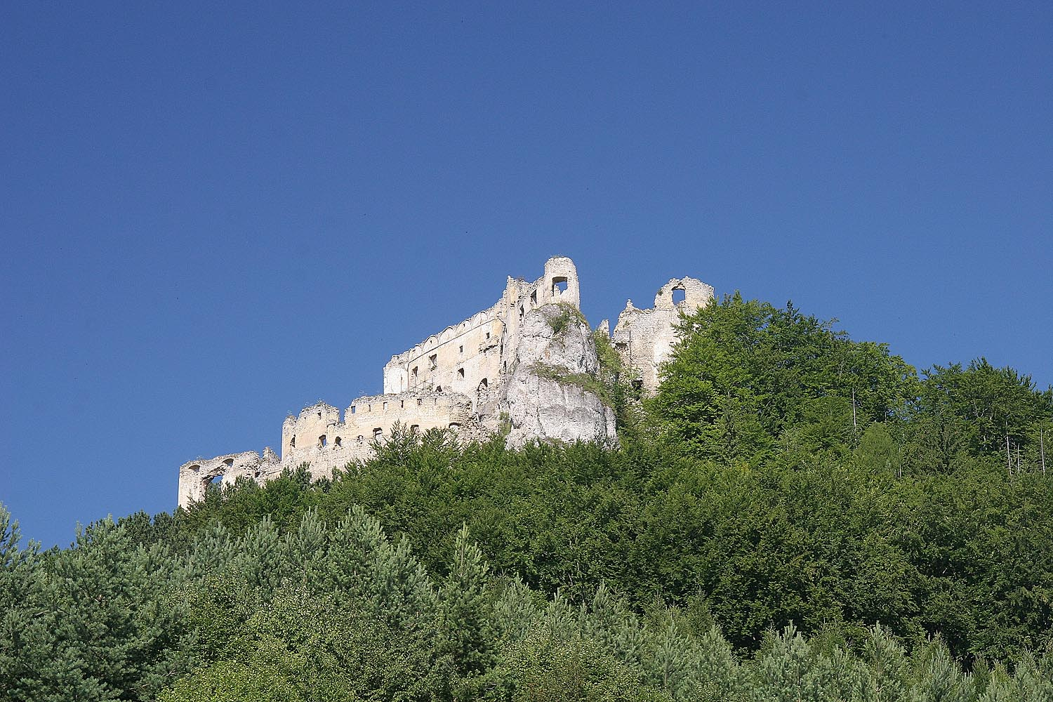 Castle Lietava - viev from Majer